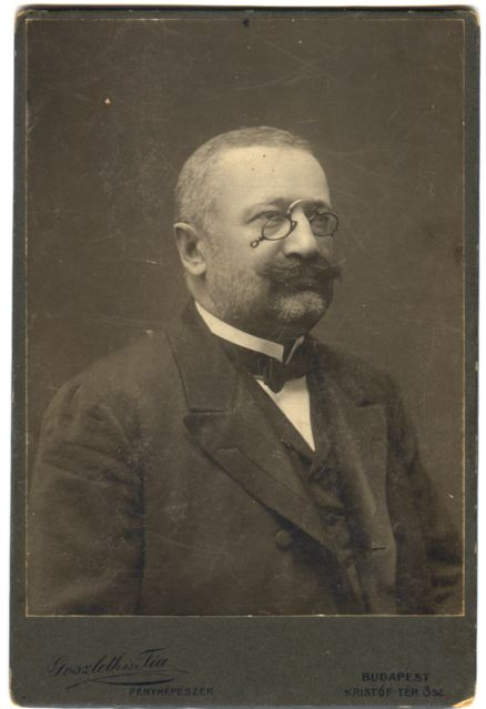 Boldogfai Farkas József (1857–1951) Zala megyei politikus, országgyűlési képviselő, földbirtokos